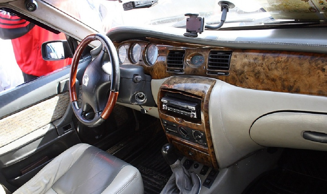 Москвич Иван Калита, салон